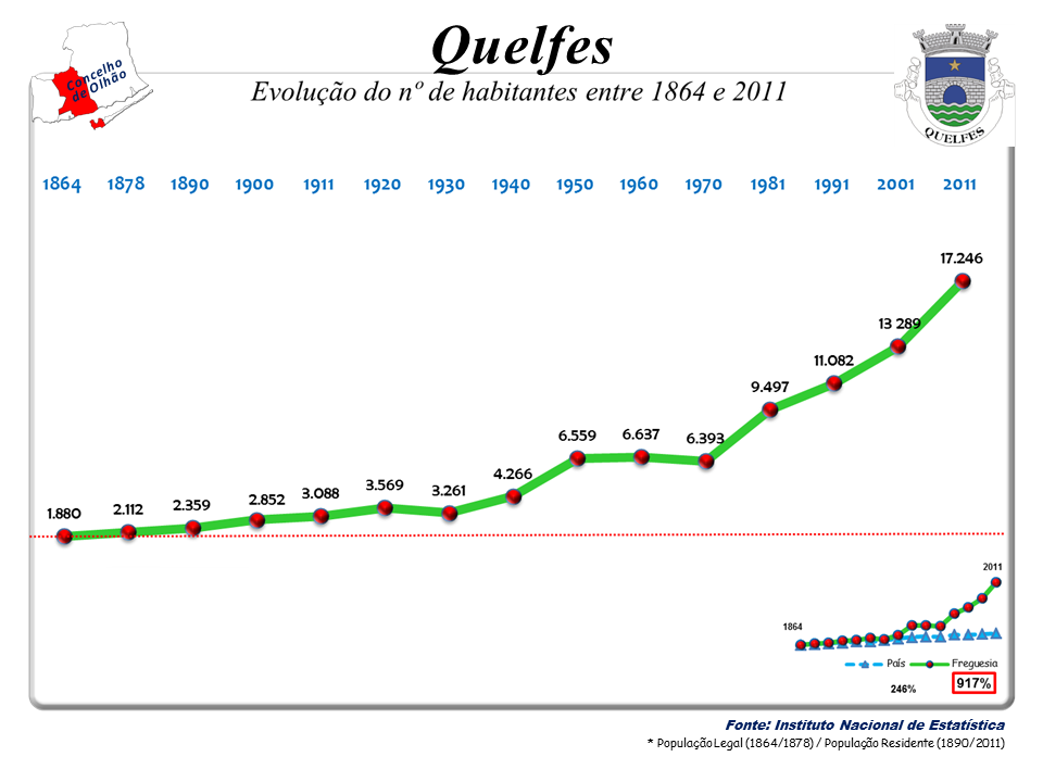 Cenos 1864/2011